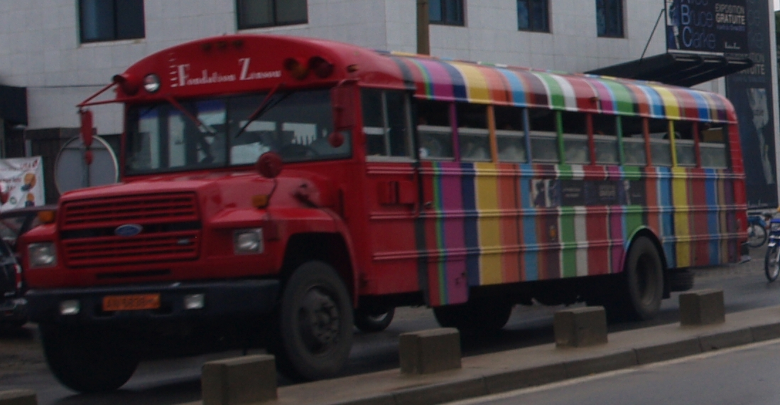 Bus de la Fondation Zinsou